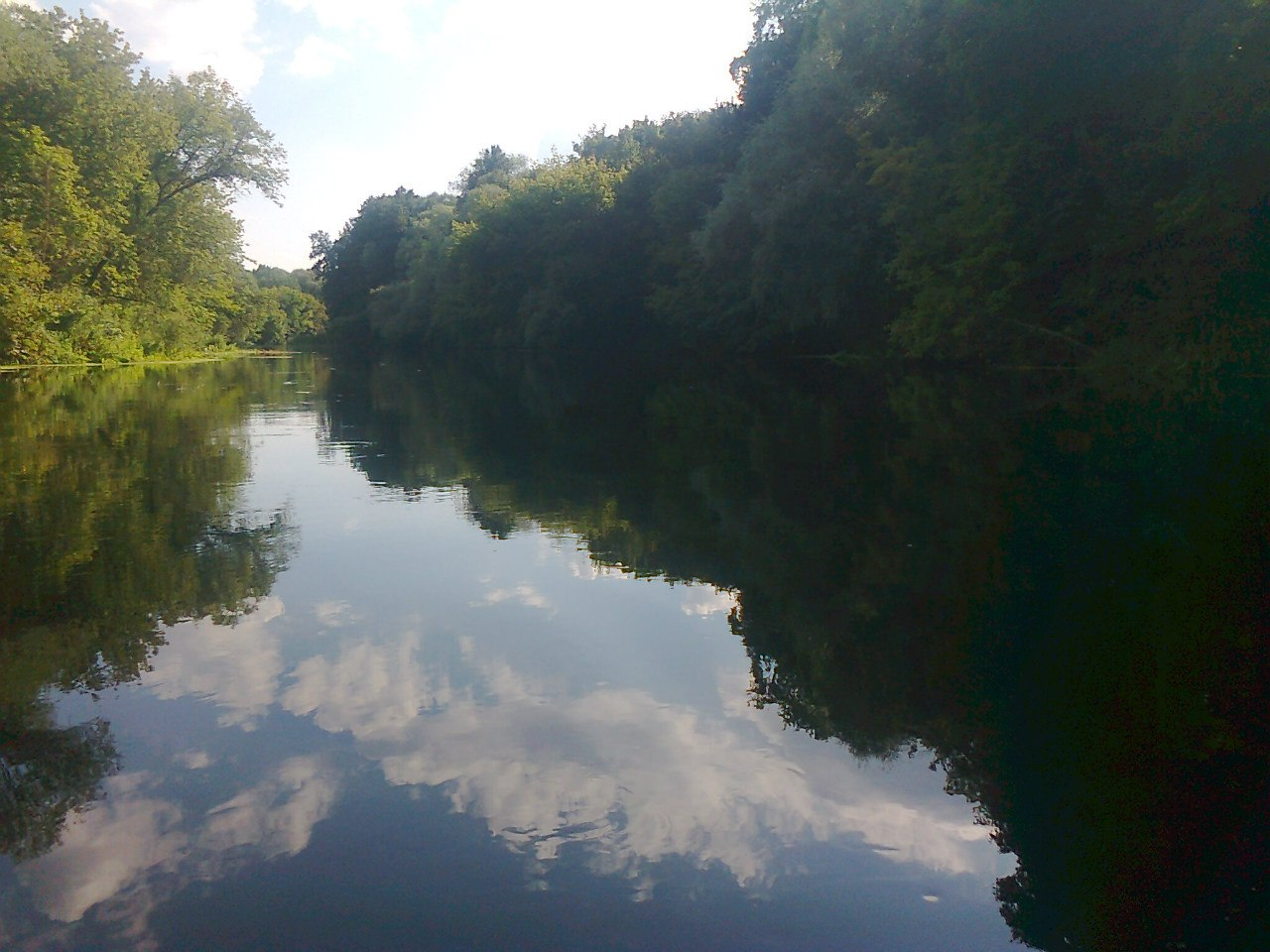 в р-не п.Пятницкое